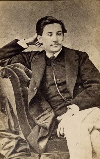 Benito Pérez Galdós hacia 1863 Fotografía de la Familia Pérez-Galdós que se expone en la Casa-Museo Pérez Galdós (Las Palmas de Gran Canaria).